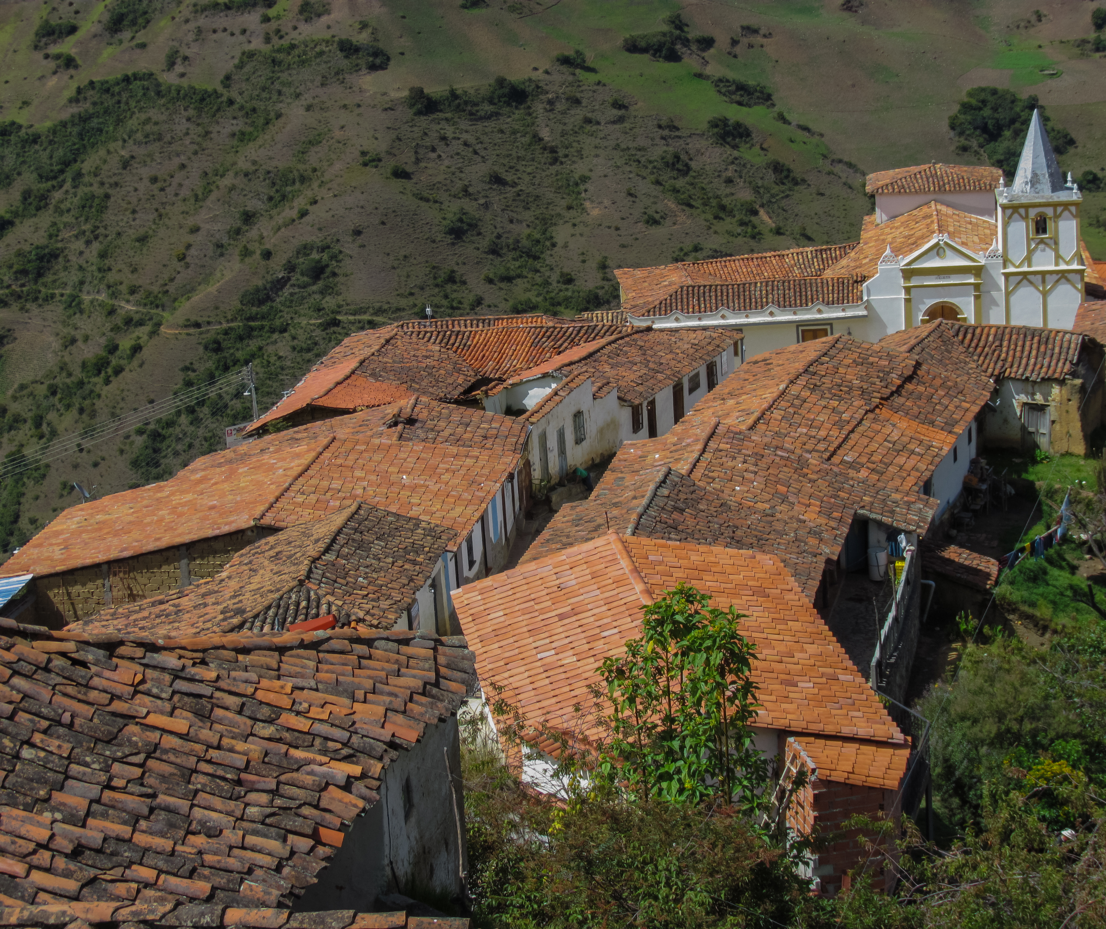 Poblacion de Los Nevados, en el Estado Merida, Venezuela